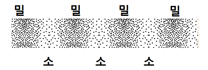 종파를 설명하는 그림